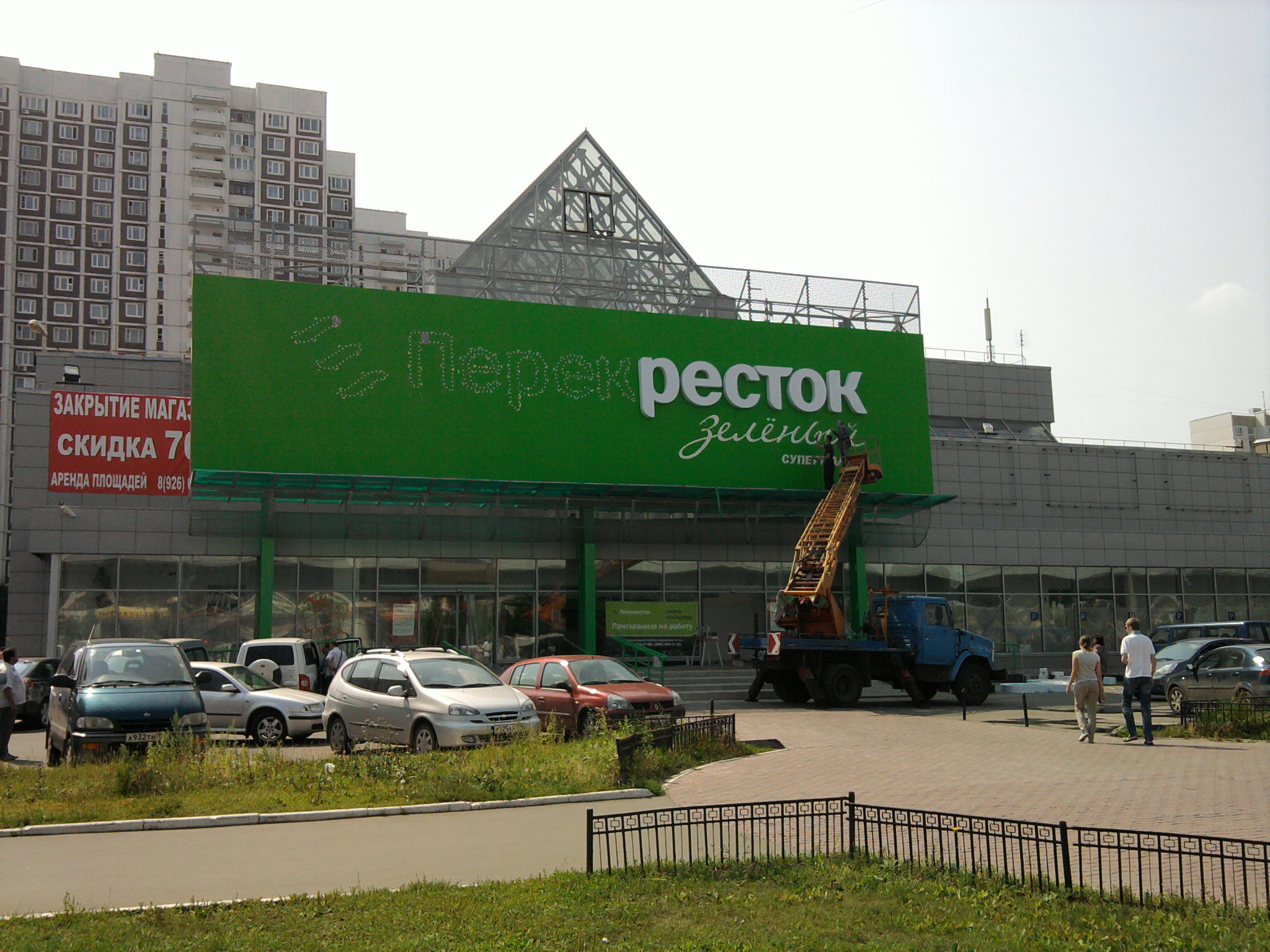 Магазин сети Перекрёсток на бульваре Адмирала Ушакова, дом 7 в Южном Бутово, Москва